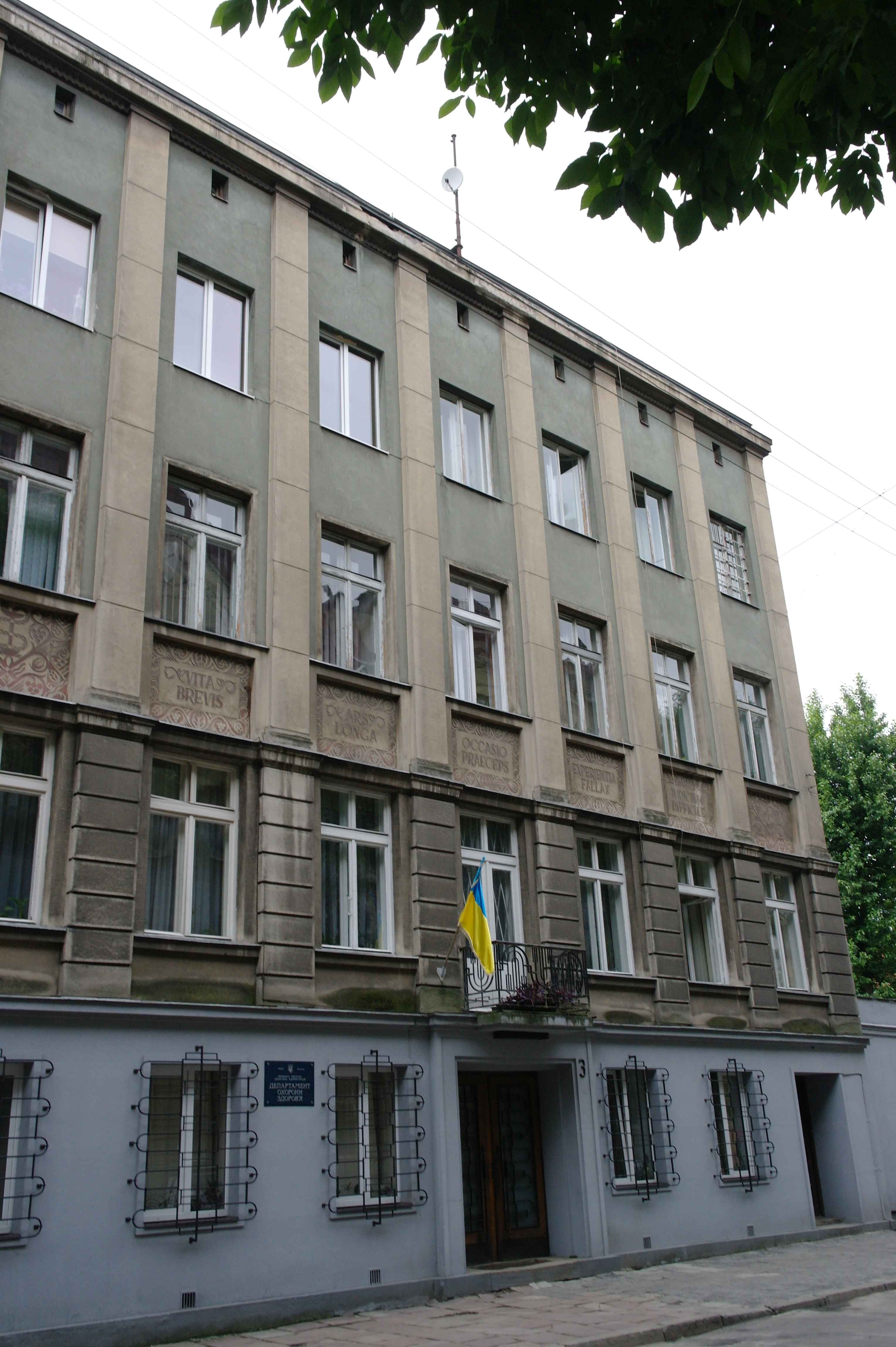 Львів, Конопницької, 3